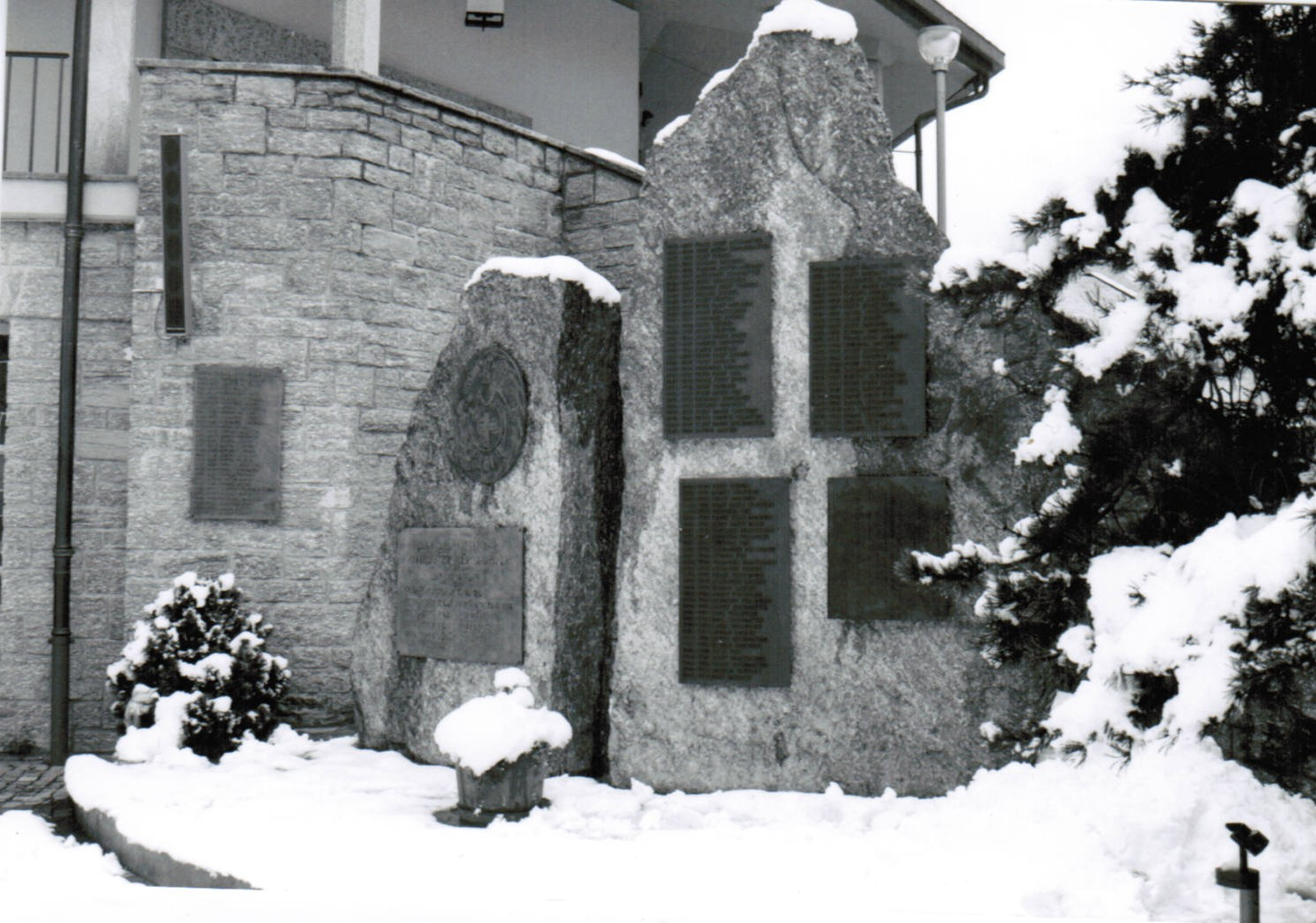 Bergführerdenkmal Schweizer Kanton Wallis